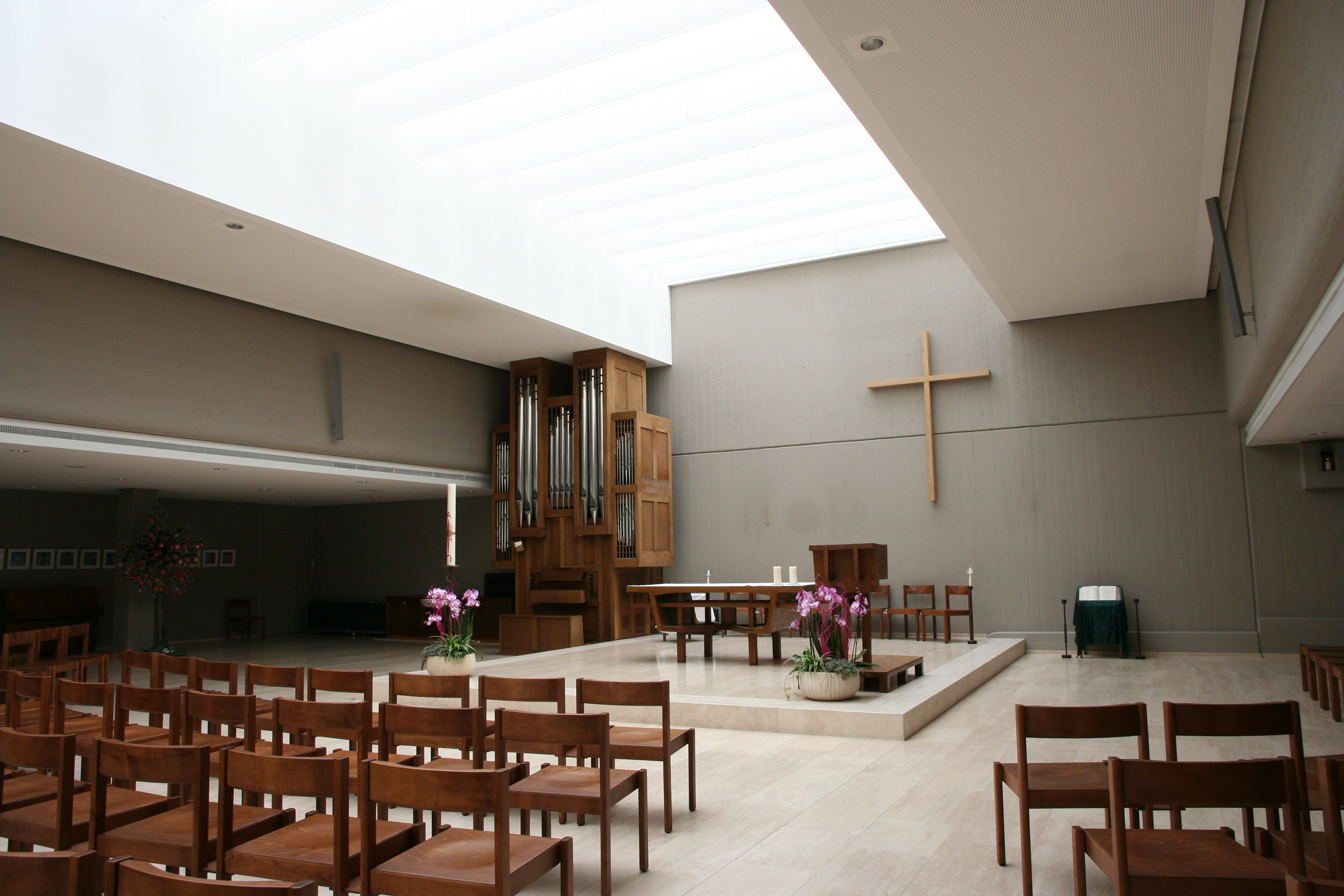 Römisch-katholische Pfarrkirche St. Johannes der Täufer Geroldswil, Innenansicht